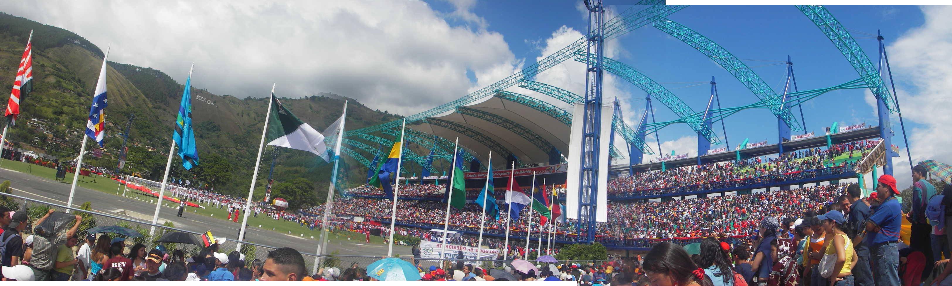 Fotografía panorámica del estado Metropolitano de Mérida (Venezuela) aún en construcción durante la inauguración de los juegos nacionales Andes 2005. Imagen tomada el 7 de diciembre de 2005 por Jorge Paparoni. Para uso externo favor citar fuente y fotógrafo.